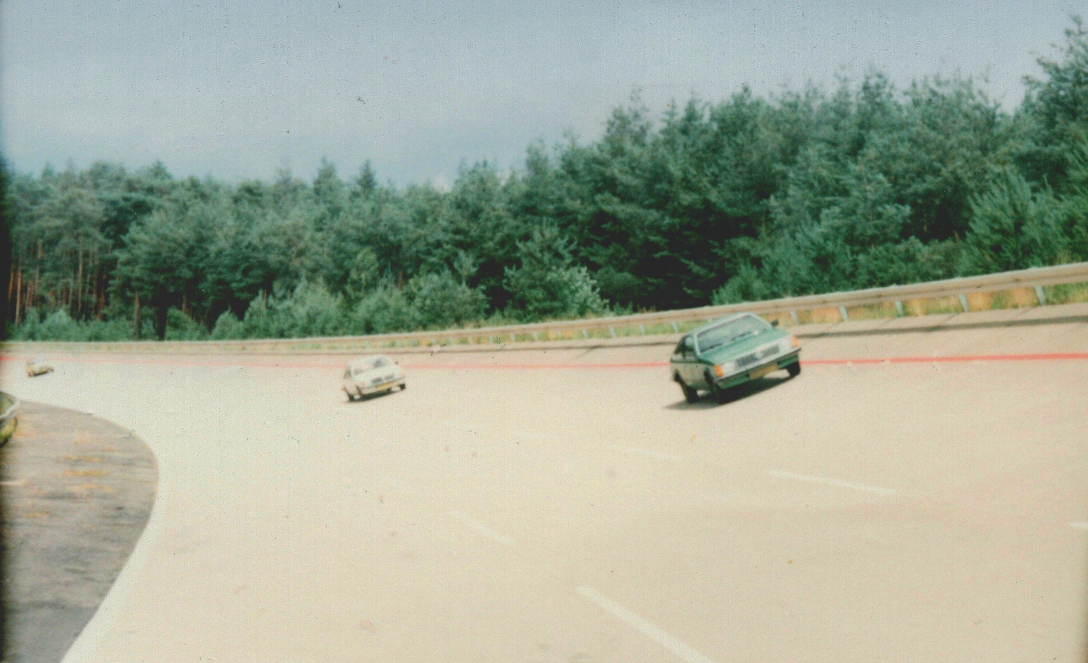 Hochgeschwindigkeitsstrecke im Opel-Prüfzentrum Rodgau - selbst fotografiert 1977 - GNU-FDL